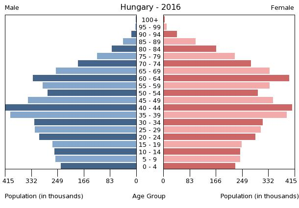 A population pyramid illustrates the age and sex structure of a country's population and may provide insights about political and social stability, as well as economic development. The population is distributed along the horizontal axis, with males shown on the left and females on the right. The male and female populations are broken down into 5-year age groups represented as horizontal bars along the vertical axis, with the youngest age groups at the bottom and the oldest at the top. The shape of the population pyramid gradually evolves over time based on fertility, mortality, and international migration trends.